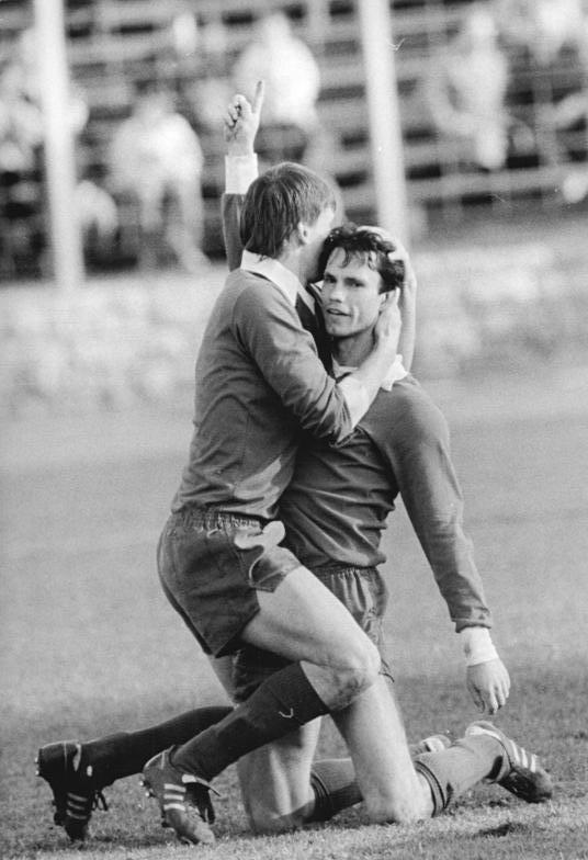 ADN-ZB-Oberst-18.3.89-sche- Berlin: Fußball-Oberliga-Punktspiel 1. FC Union - BFC Dynamo 2:3 (1:1)- Mehr als 10 000 Zuschauer sahen im Stadion der Weltjugend ein torreiches Ortsderby. Freude natürlich auch bei Abwehrspieler Bernd Schulz (r) und Mannschaftskapitän Frank Rohde, die mit je einem Treffer an der Ausbeute des BFC Beteiligt waren.